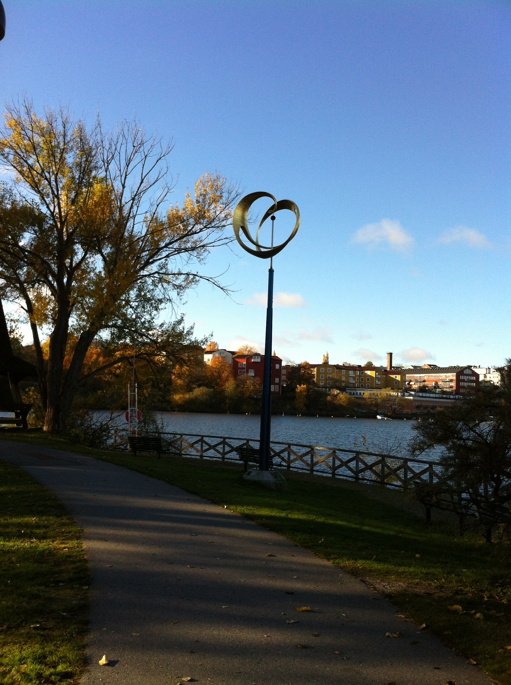 Nils Nixons Galaxen, Västra udden på Reimersholme, Stockholm